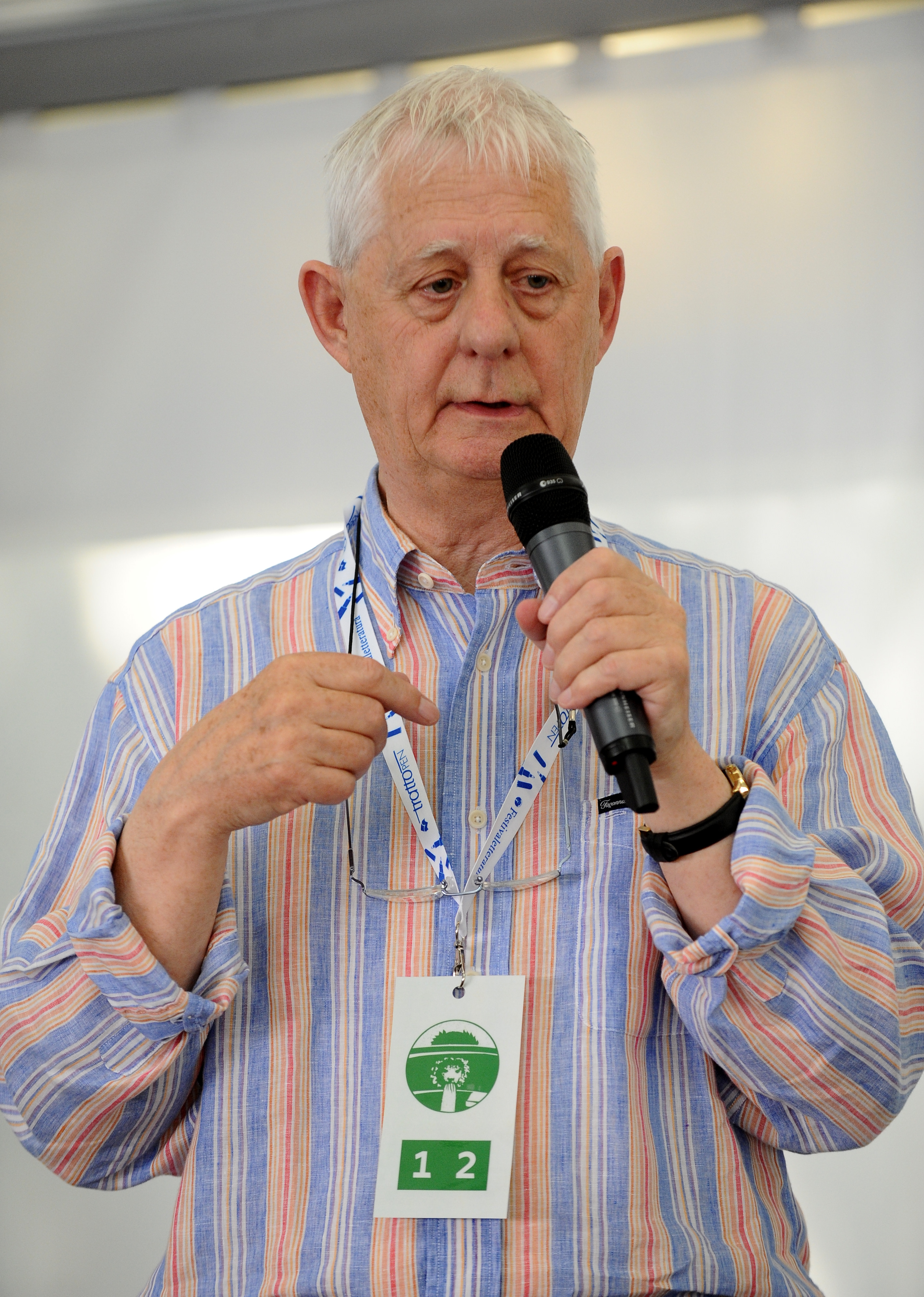 Aidan Chambers a Mantova per il Festivaletteratura 2012.